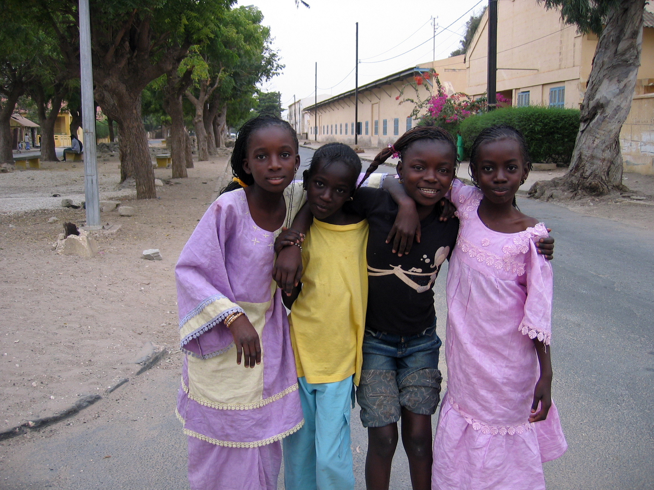 Fillettes sur une avenue de Saint-Louis (Sénégal)